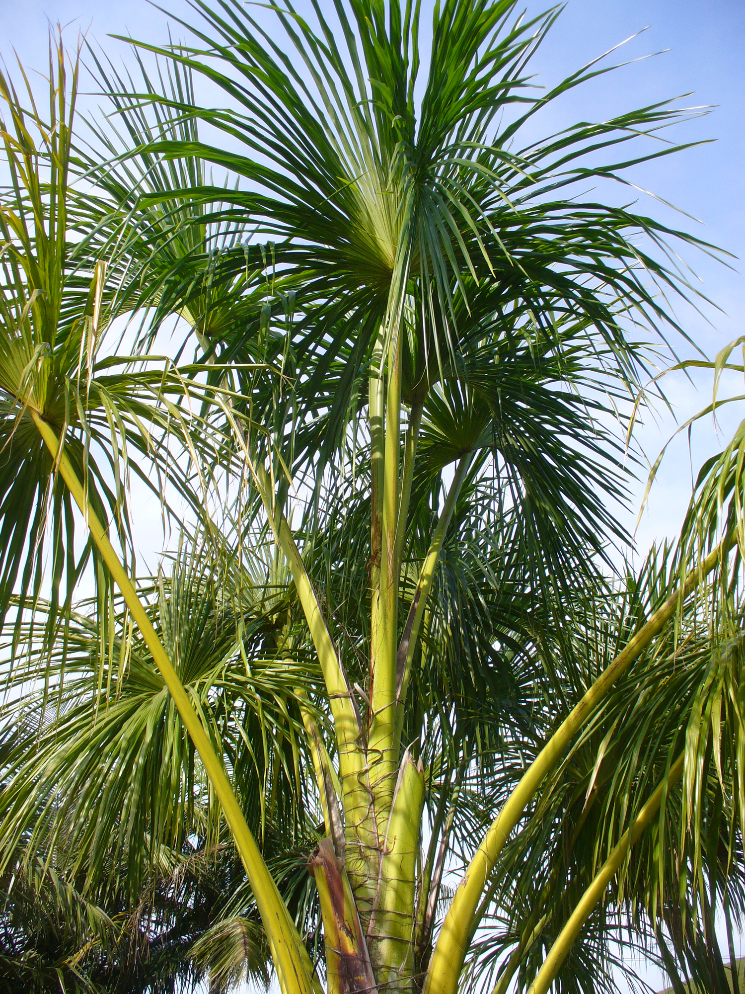 cultivated, Boa Esperanza ranch, Brazil.